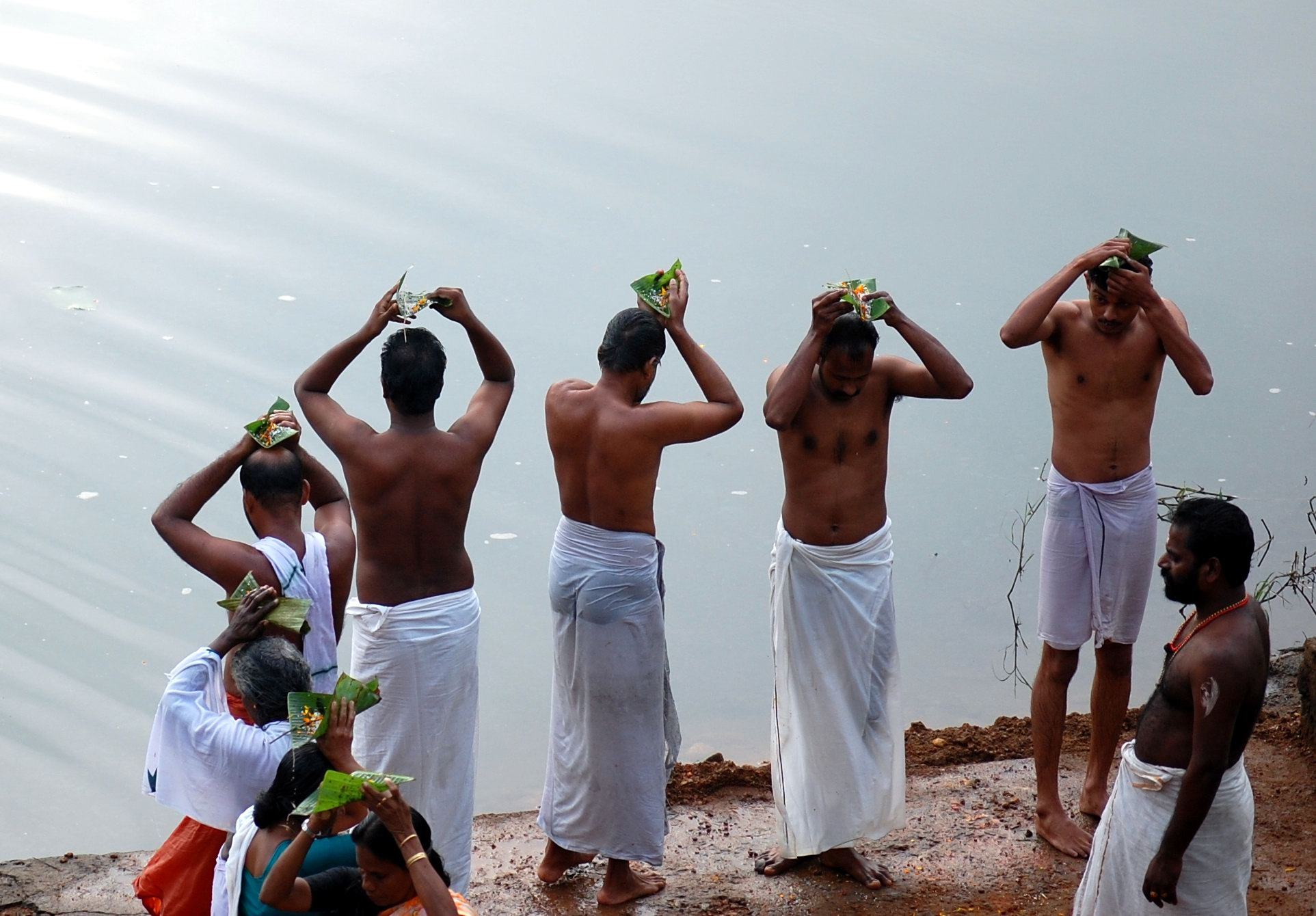 പ്രദക്ഷിണം